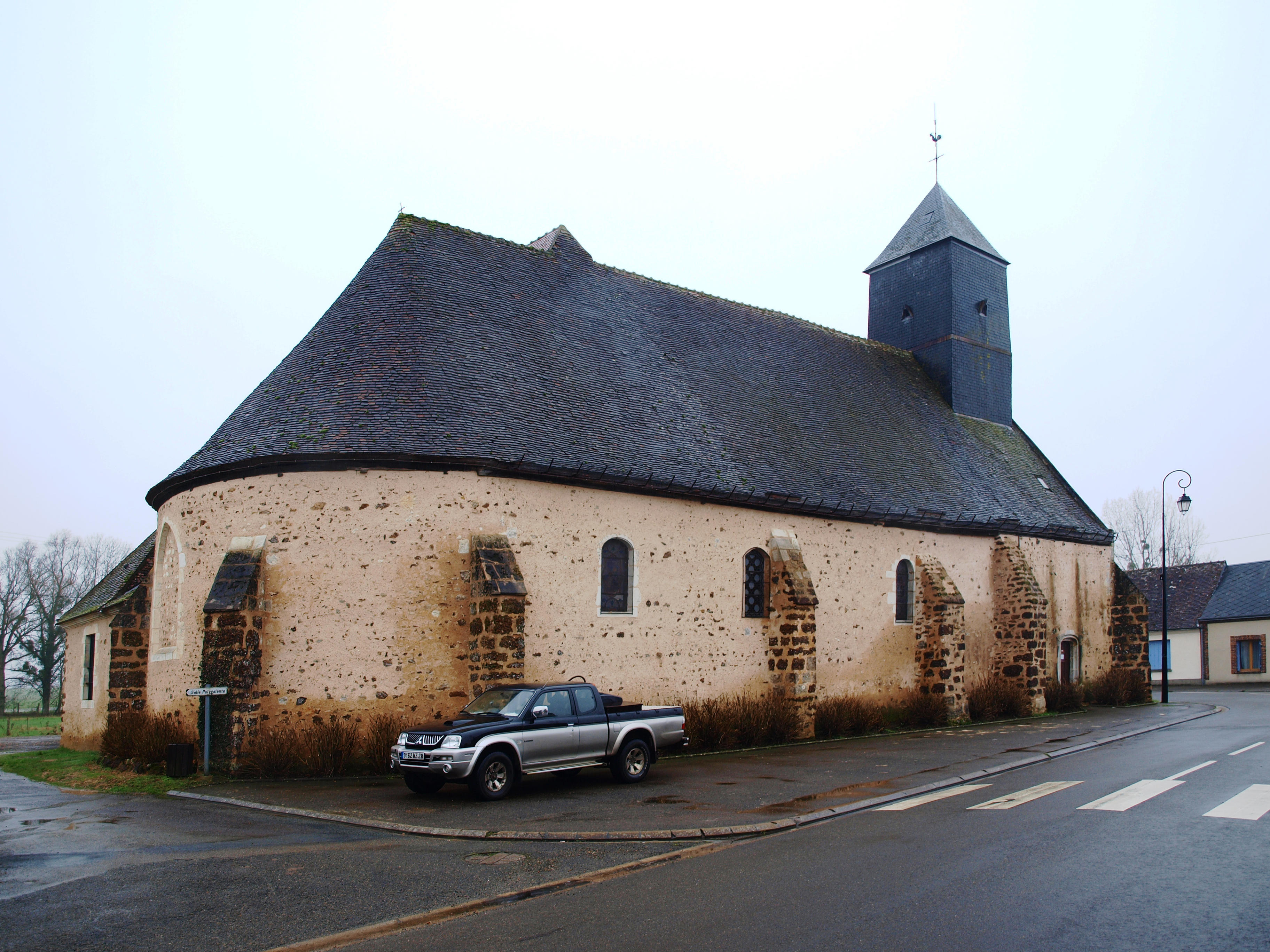 Dampierre-sous-Brou (Eure-et-Loir, France) ; église